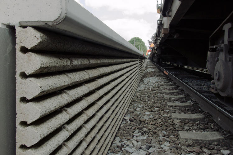 Niedrigschallschutzwände der Firma Betonwerk Rieder GmbH